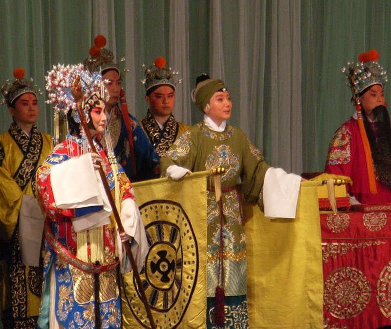 《红鬃烈马·大登殿》剧照